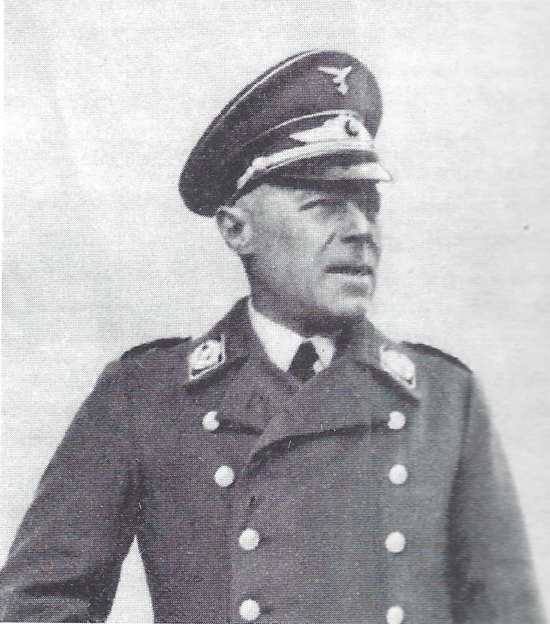 Alfred Haubold als Oberst und Kommandeur der Flakartillerieschule in Wustrow